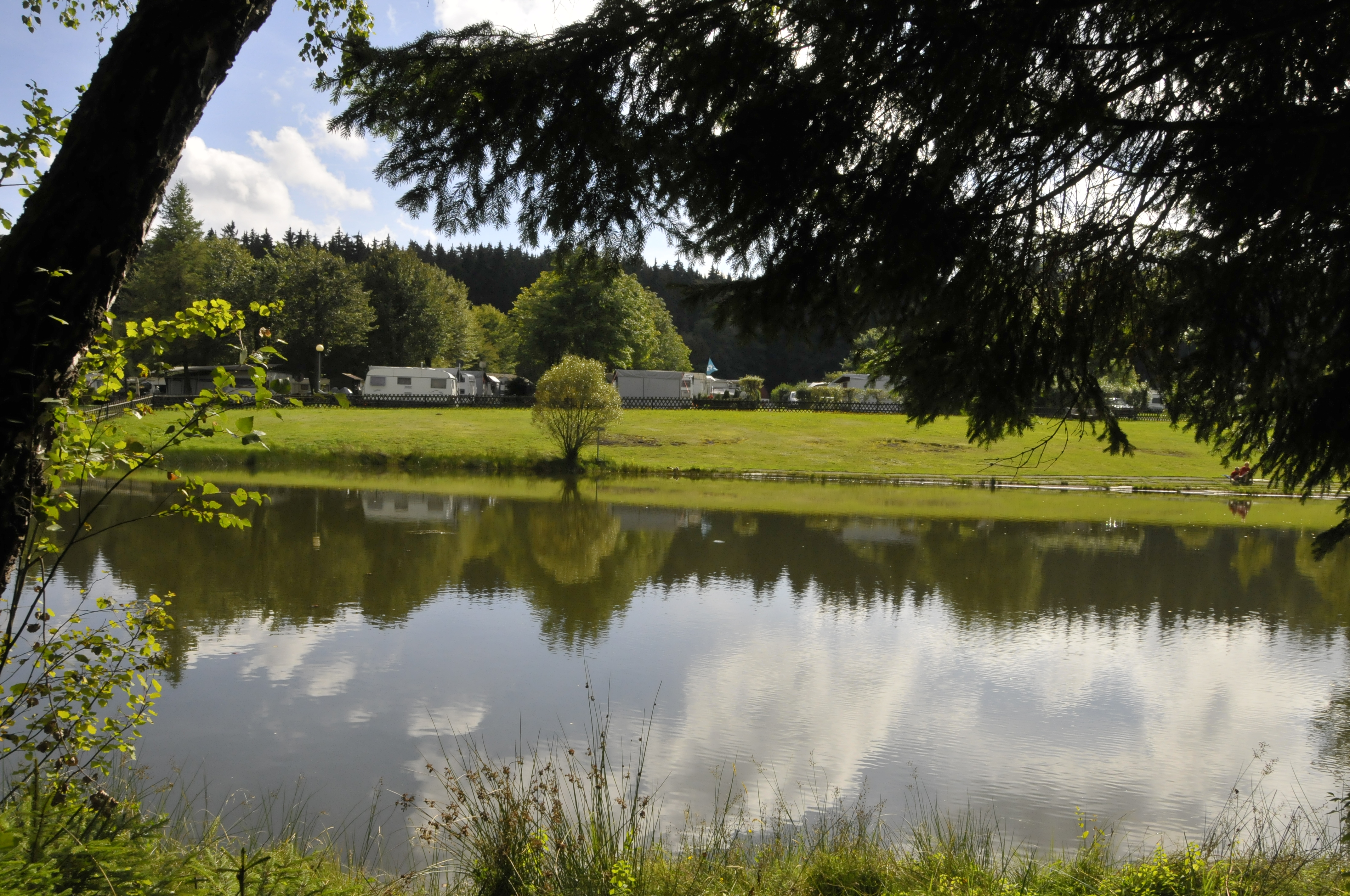 Catterfeld-Altenbergen, Campingplatz Paulfeld